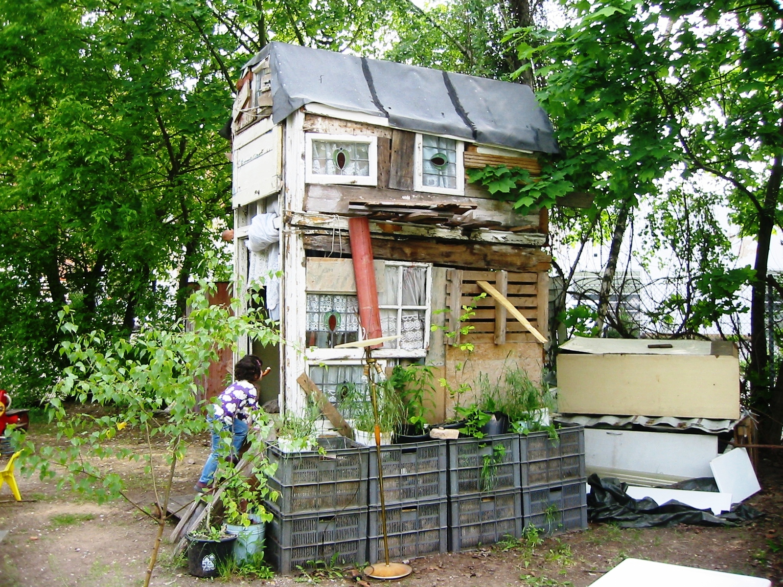 Prinzessinnengärten in Berlin-Kreuzberg: Spielmöglichkeiten für Kinder